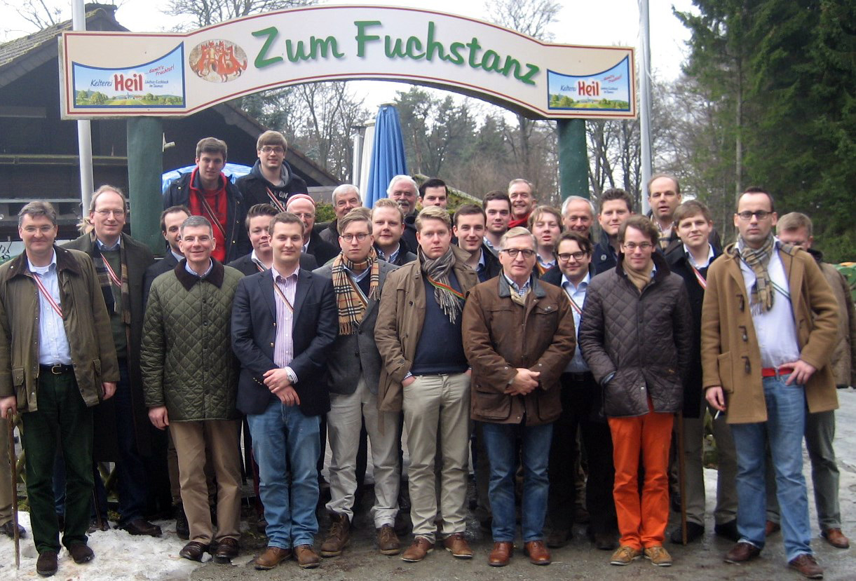 Treffen des grünen Kreises in Königstein im Taunus